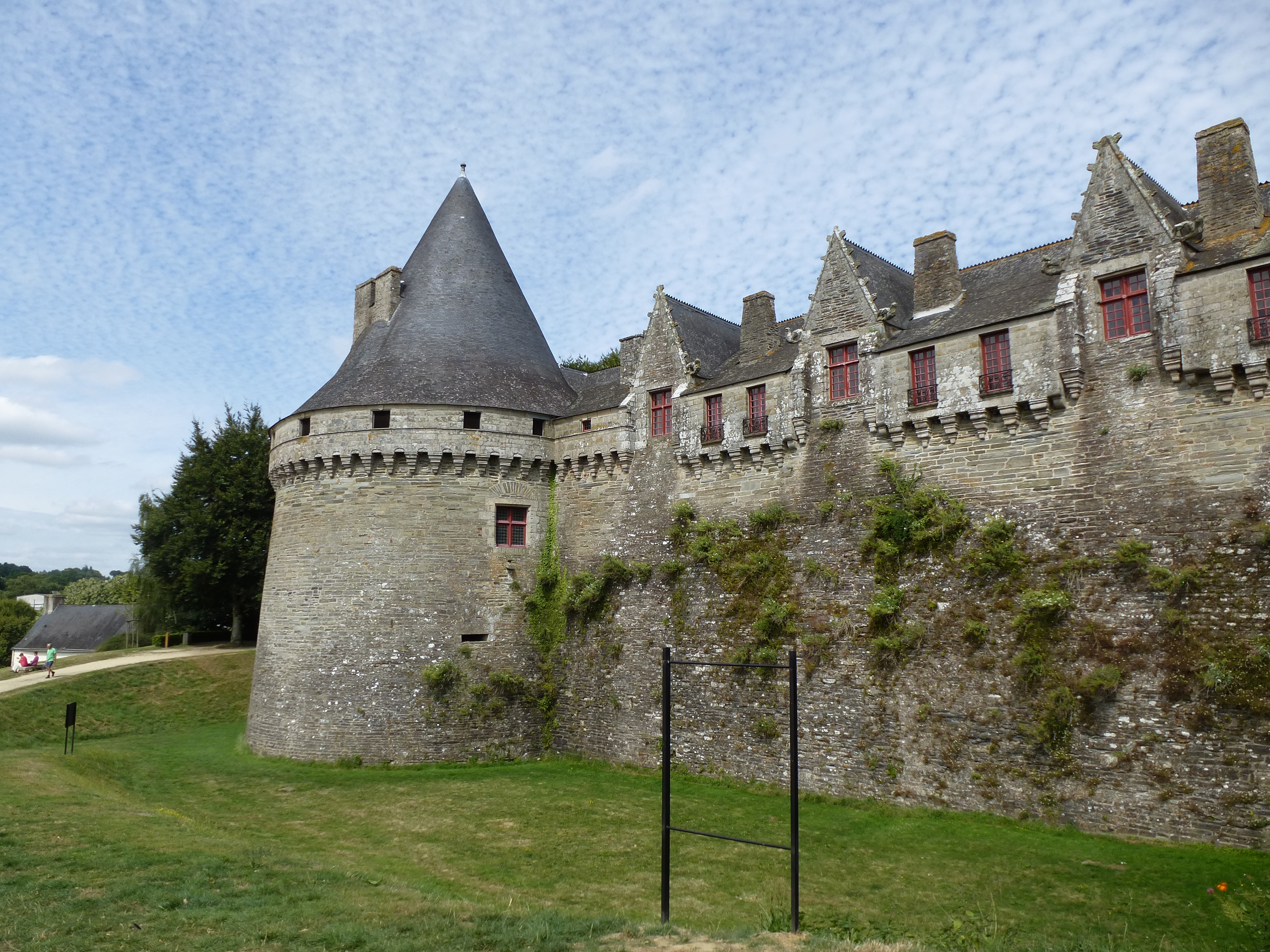 le chateau des rohan